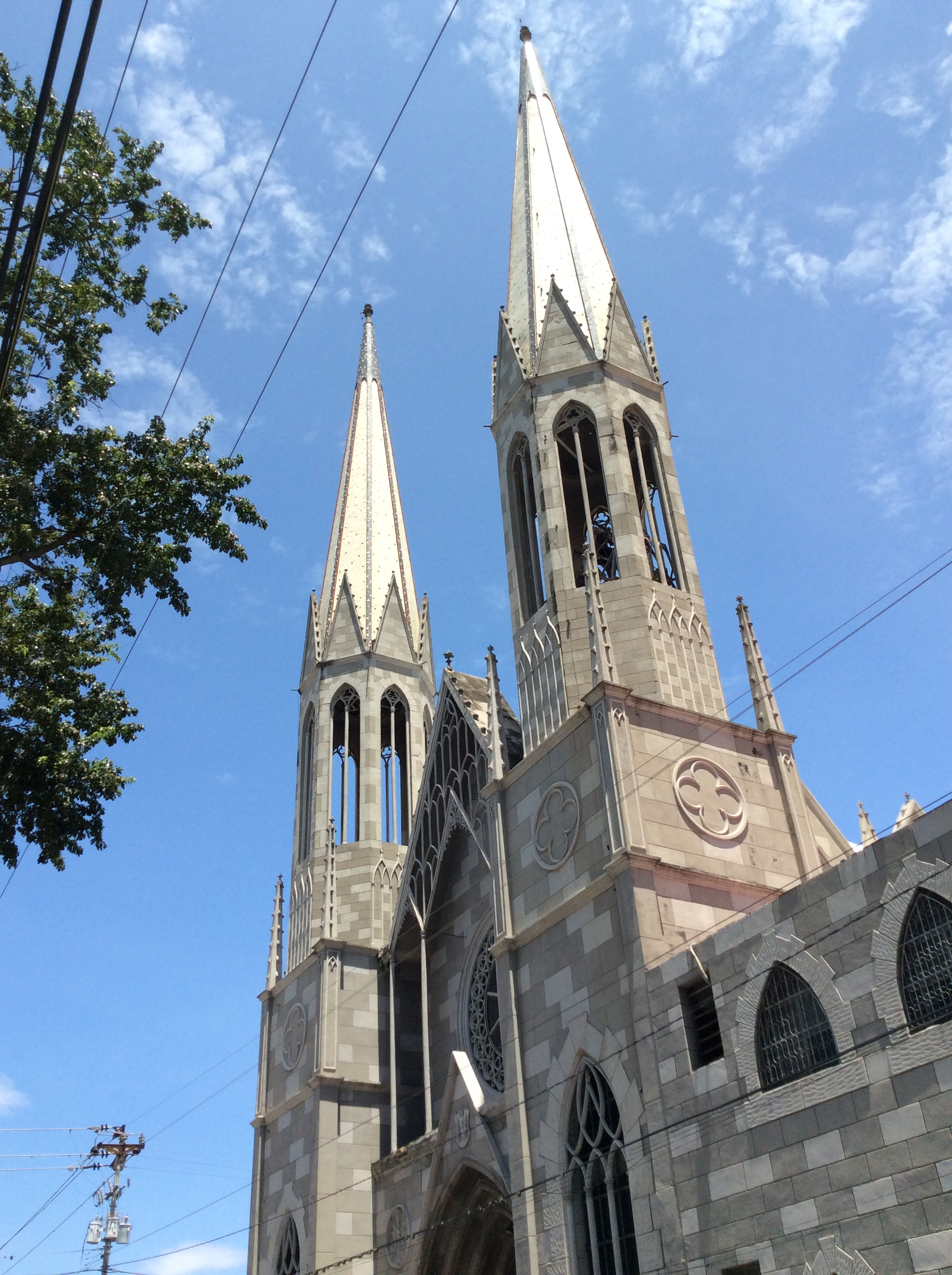 El espacio se percibe de manera continua con alturas considerables que expresan la verticalidad característica del estilo gótico.